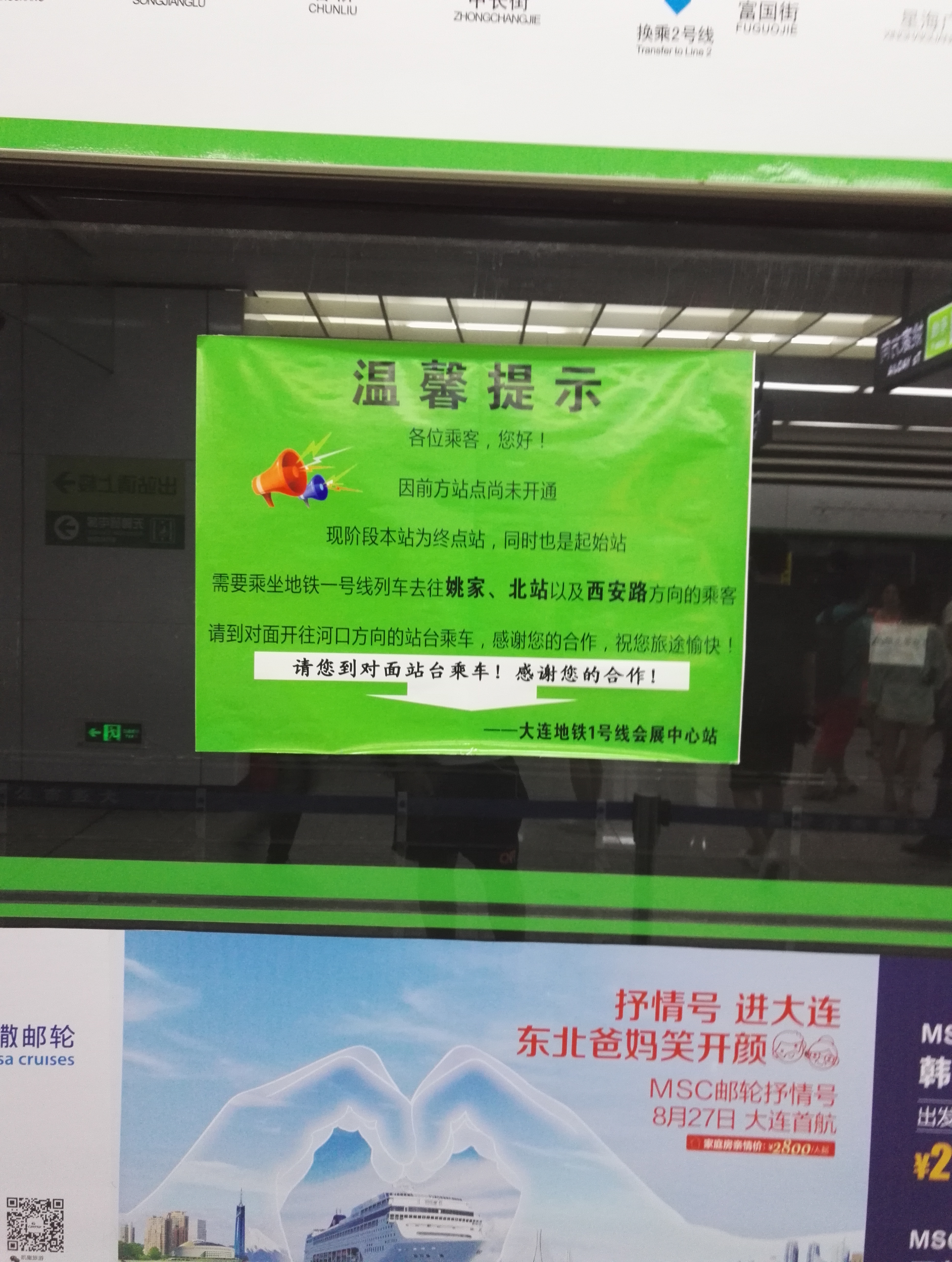 大连地铁1号线会展中心站温馨提示。